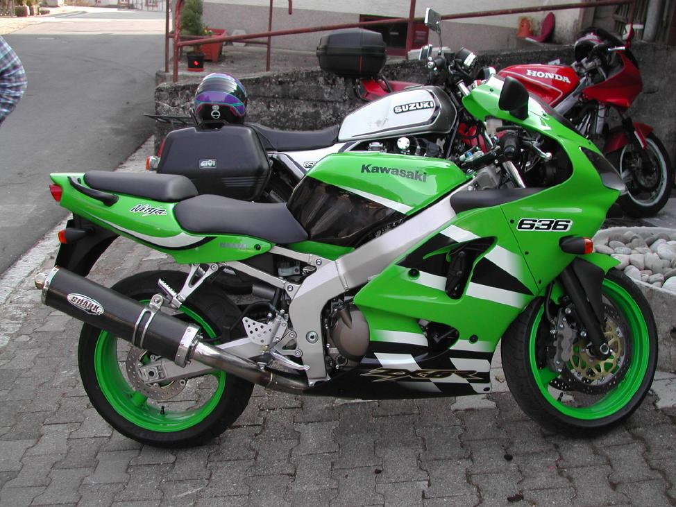 Kawasaki ZX6R Baujahr 2002